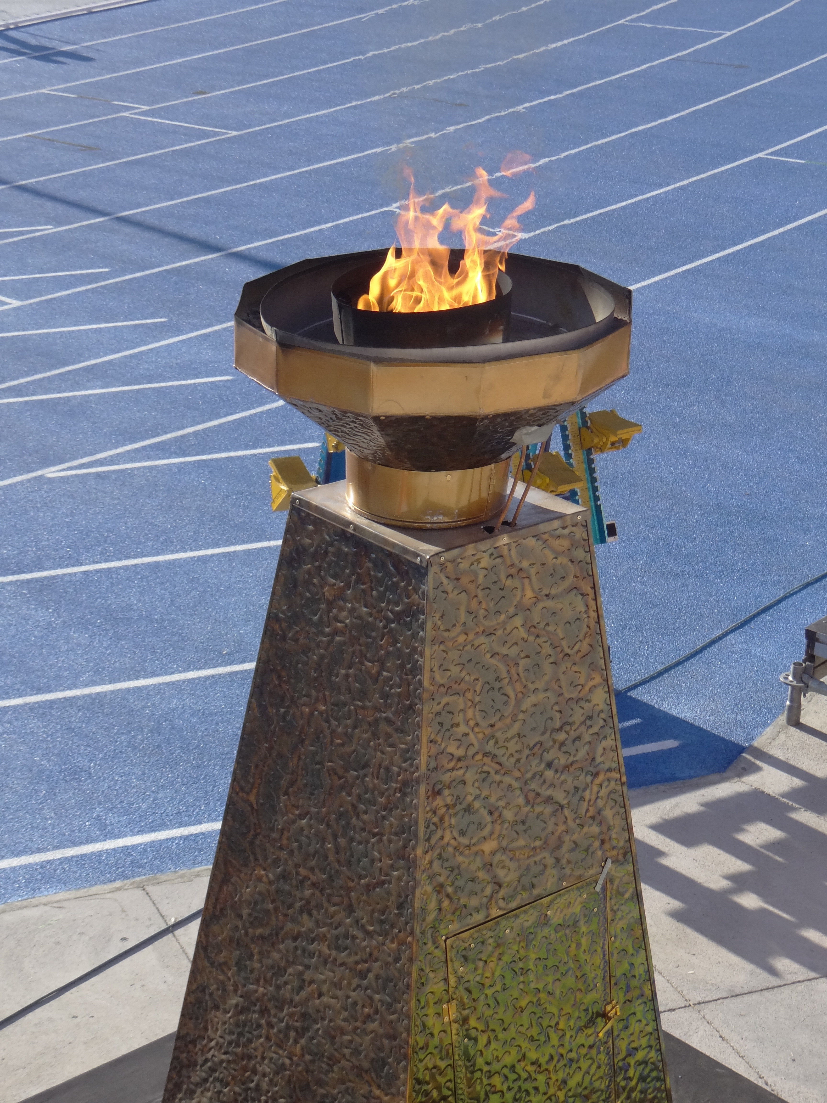 X Juegos Suramericanos Santiago 2014 Estadio Nacional Flama olímpica Jornada 13.03.2014